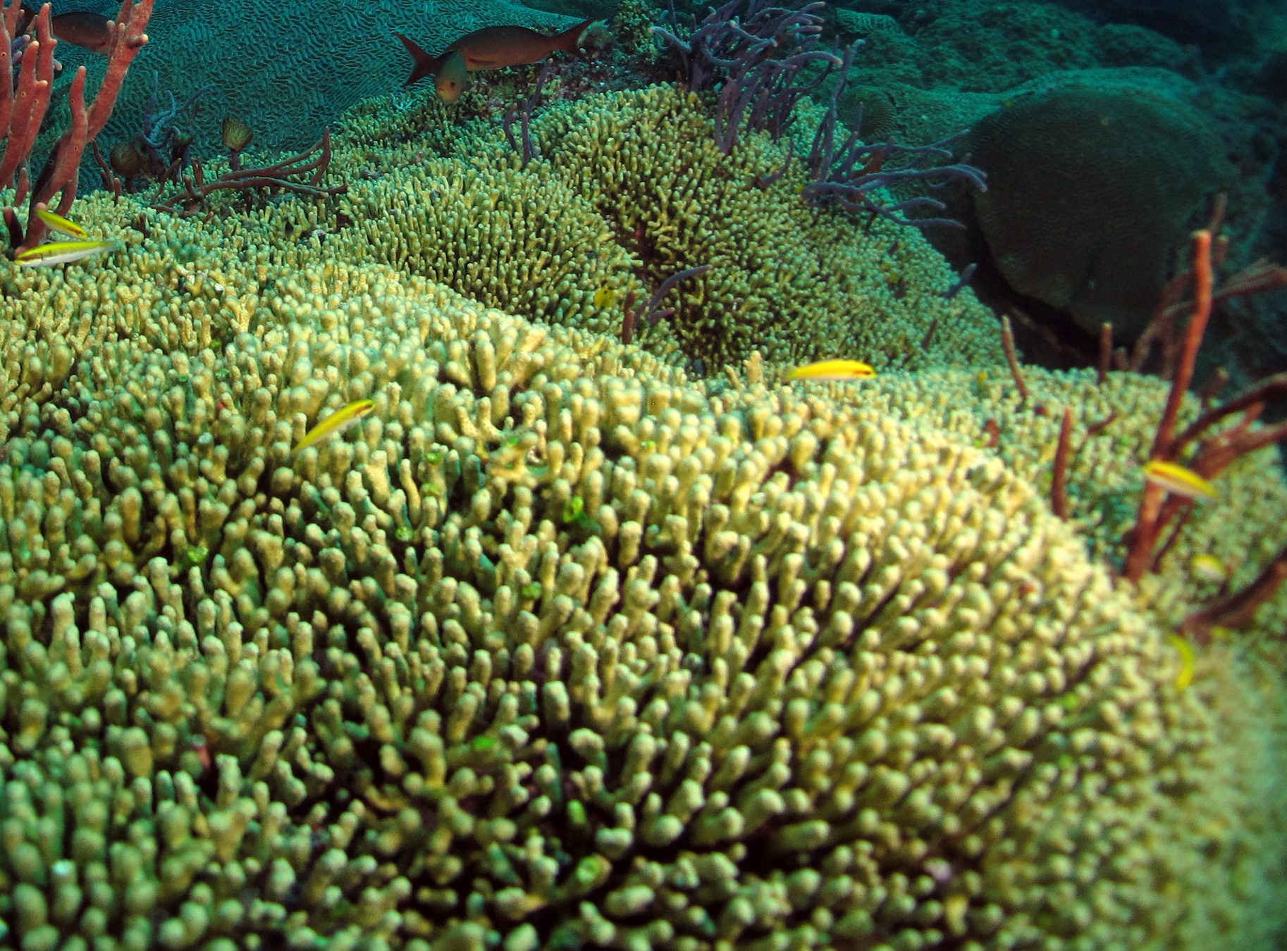 Madracis auretenra en Flower Garden Banks, EE.UU.